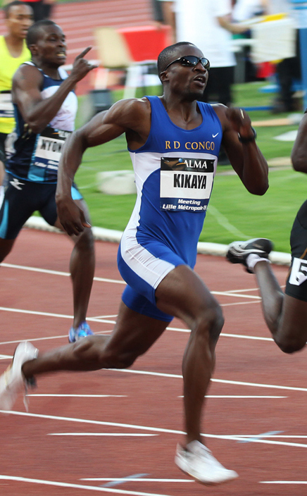 Gary Kikaya